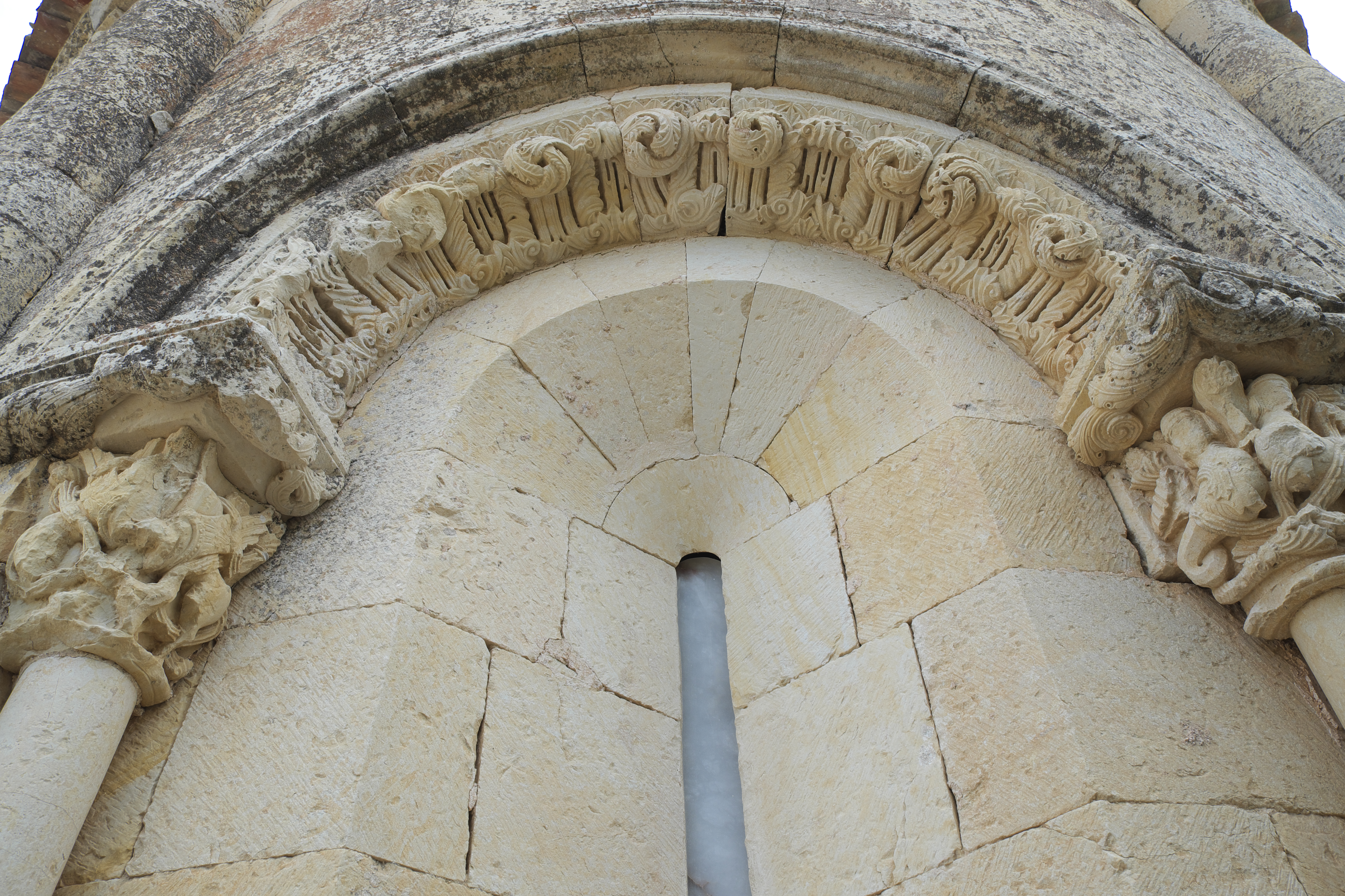 Ermita de Santa Cecilia in Vallespinoso de Aguilar in der Provinz Palencia (Kastilien-León/Spanien), Apsisfenster